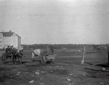 Miehiä ja hevoskärryjä Tammelan vainioilla